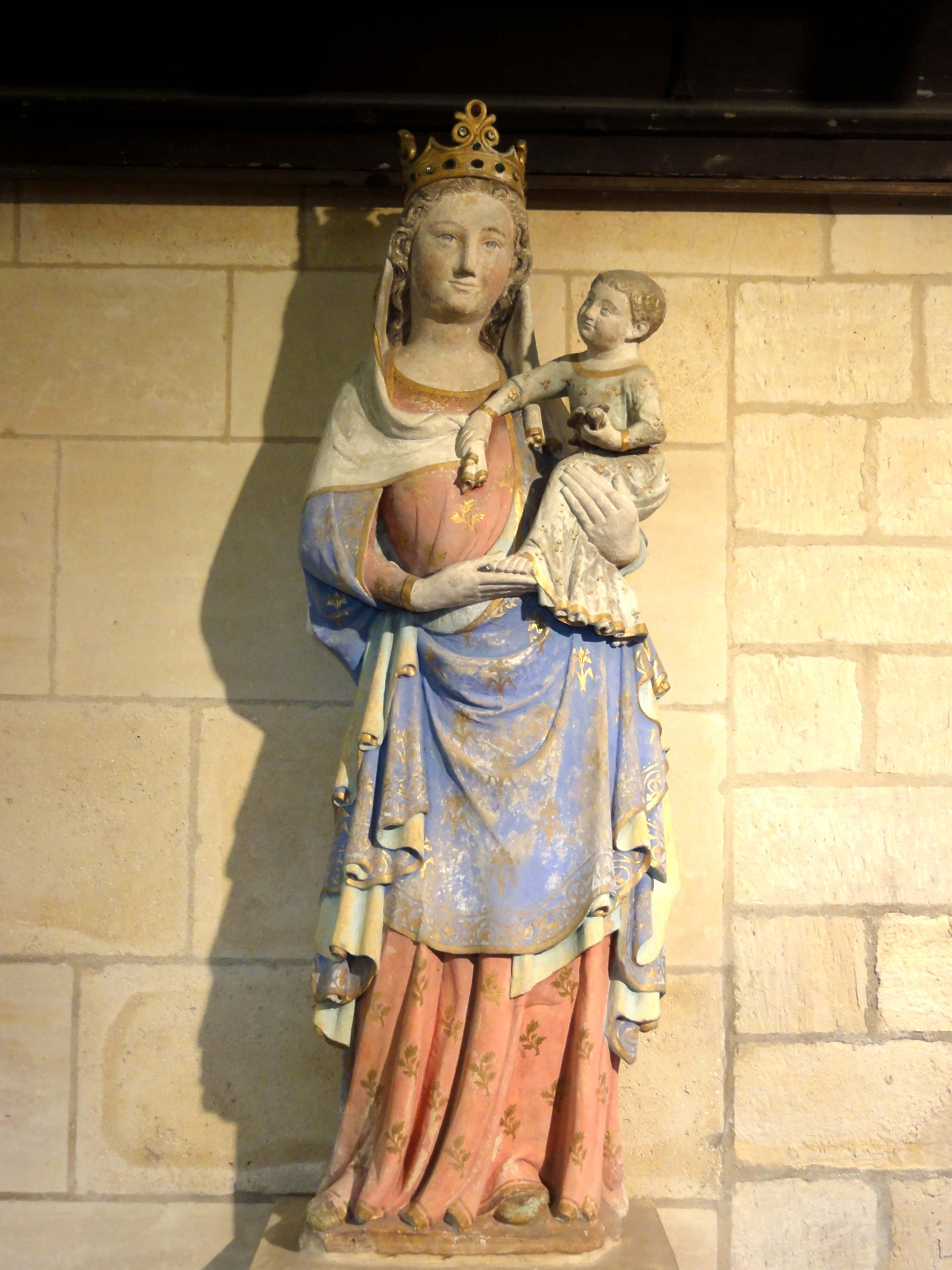 Mobilier de l'église (voir titre).